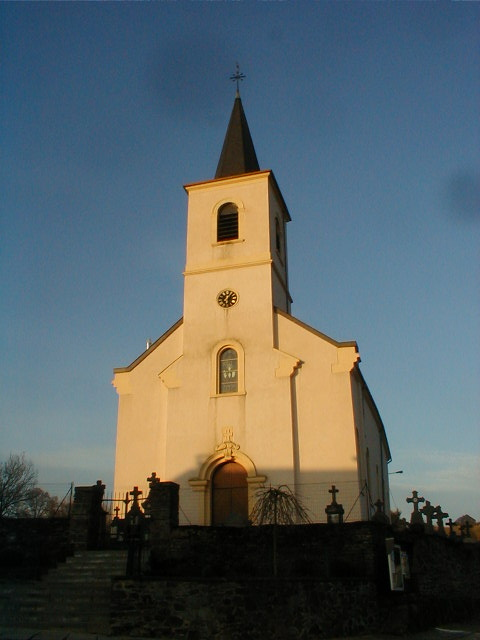 Walon: Eglijhe di Straimont